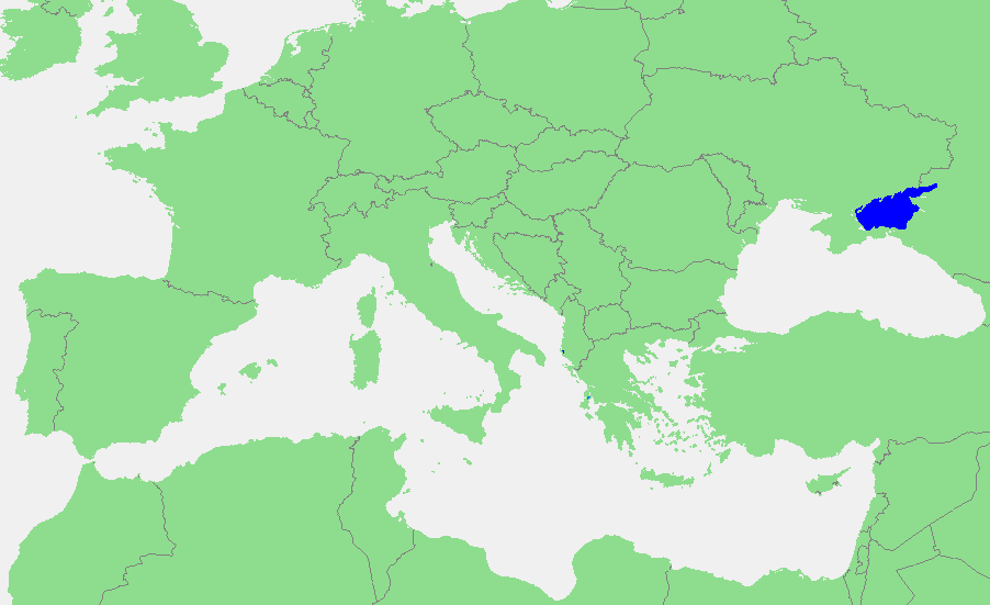 In dutch: Locatie Zee van Azov.PNG